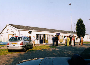 EAC-m Clubhuis